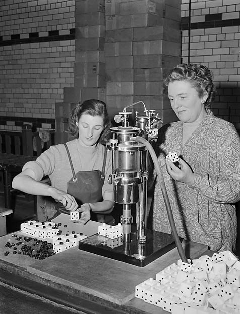 Teitl Cymraeg/Welsh title: Antur newydd Welsh Perfumery yn Bermo Nodyn/Note: Images shows E. Price and Joan Garner filling and sealing bottles. Cyfrwng/Medium: Negydd ffilm / Film negative Cyfeiriad/Reference: (gch05404) Rhif cofnod / Record no.: 3367575 Rhagor o wybodaeth am gasgliad Geoff Charles yn Llyfrgell Genedlaethol Cymru More information about the Geoff Charles Collection at the National Library of Wales